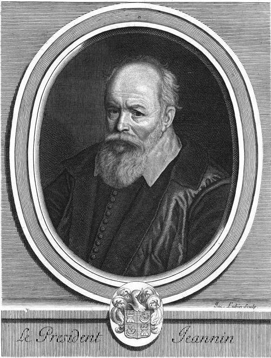 "Le président Jeannin".